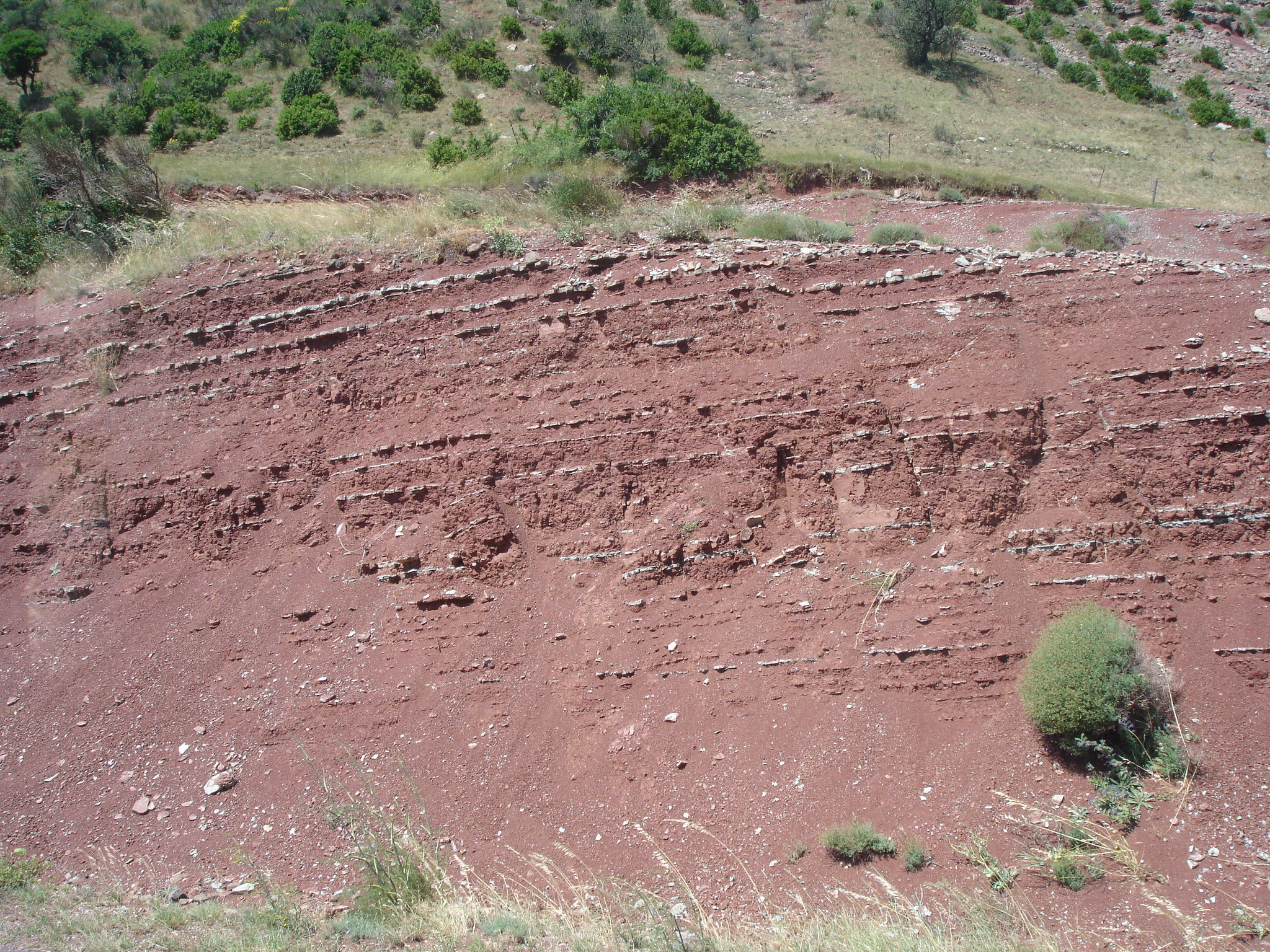 Argilite au Bassin de Lodève en France dans l'Hérault (34), la Lieude, Mérifons. Argile rouge avec du fer oxydé, argile bleu vert avec du fer